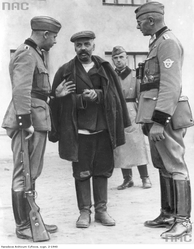 Пленение генерал-майора Михаила Тимофеевича Романова